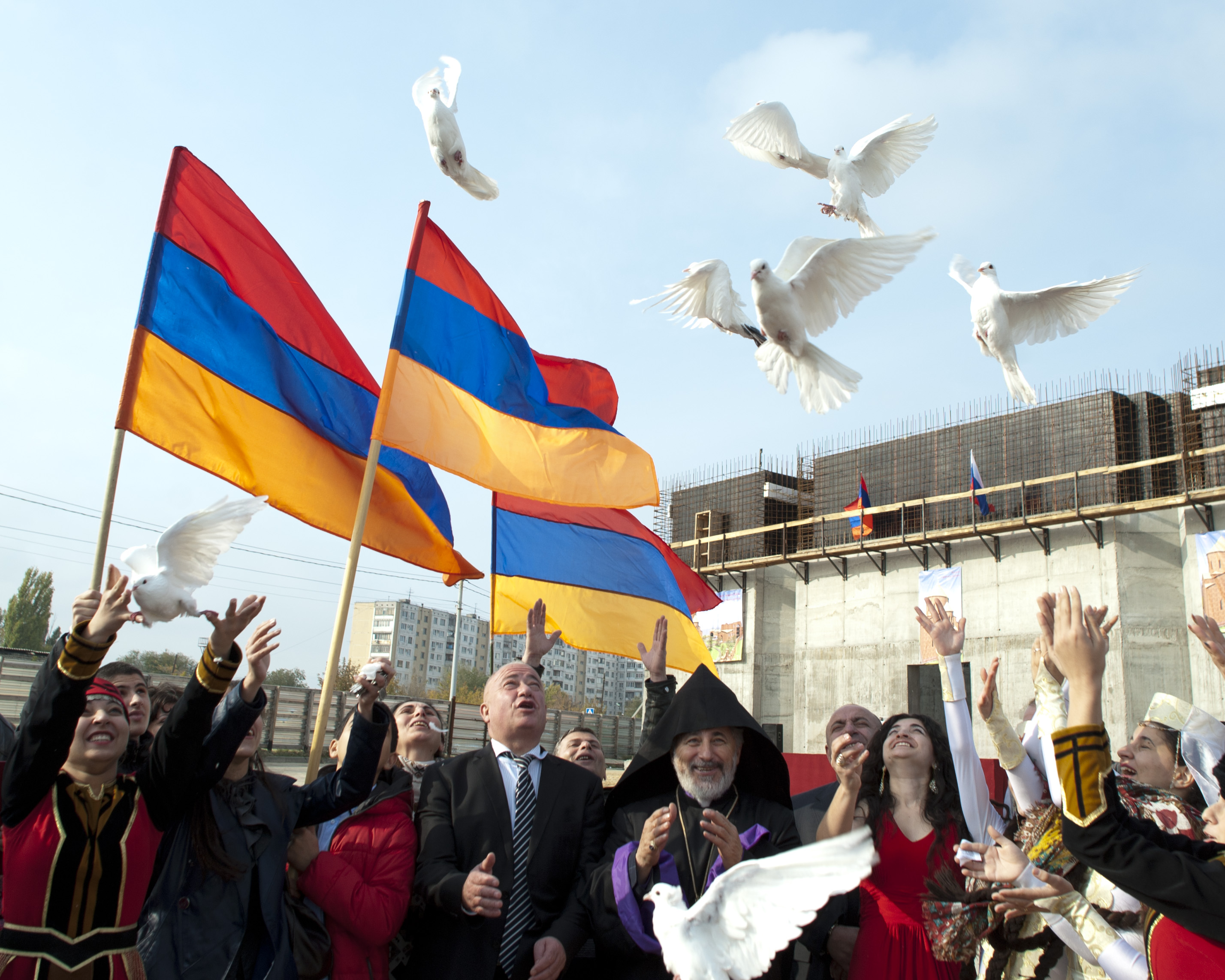 Празднование в честь церемонии освящения